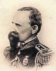 Retrato del militar de Uruguay, Leandro Gómez (1811 - 1865).